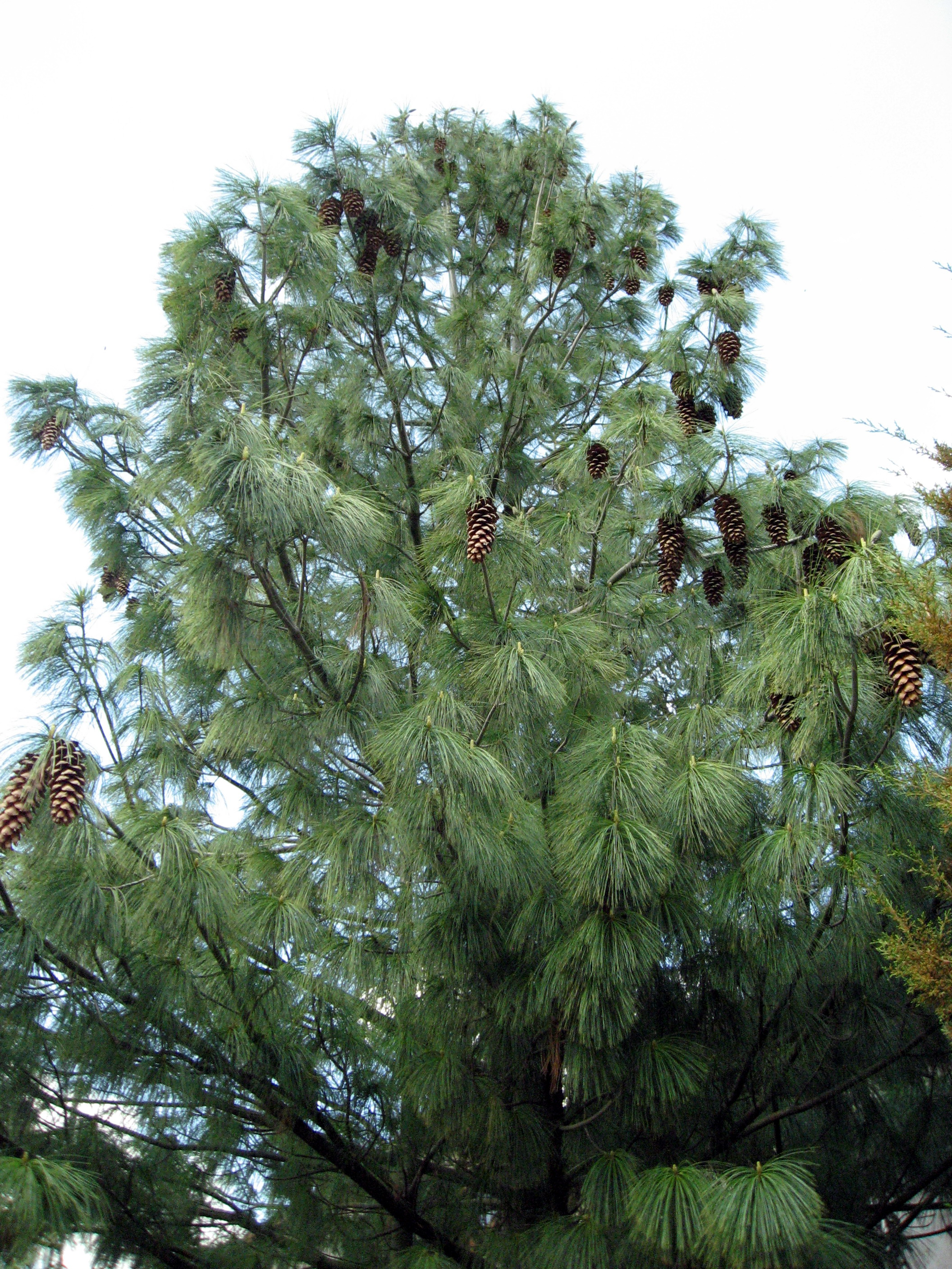 Borovice ve Střelicích